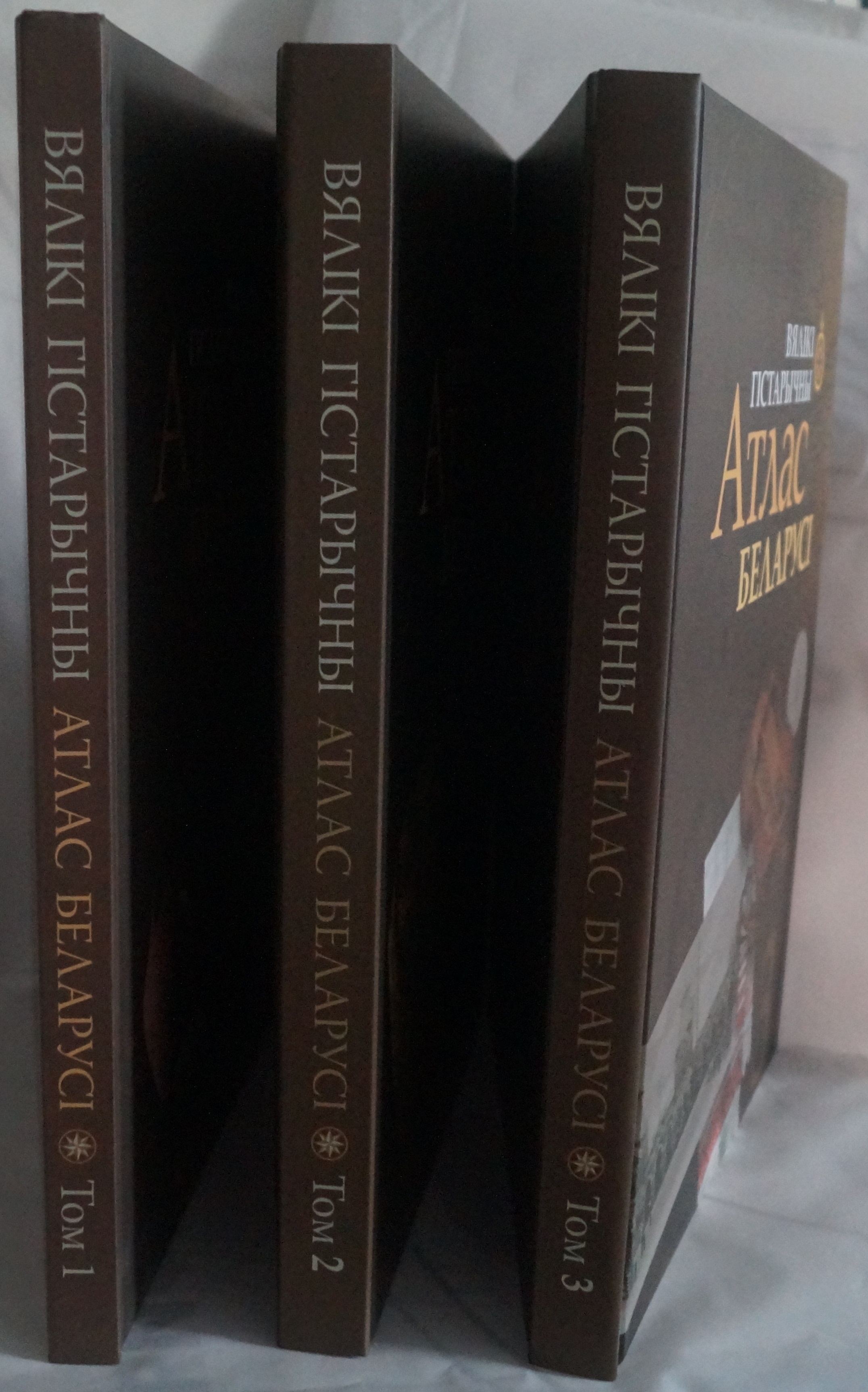 Беларуская (тарашкевіца): Вялікі гістарычны атляс Беларусі, т. 1—3